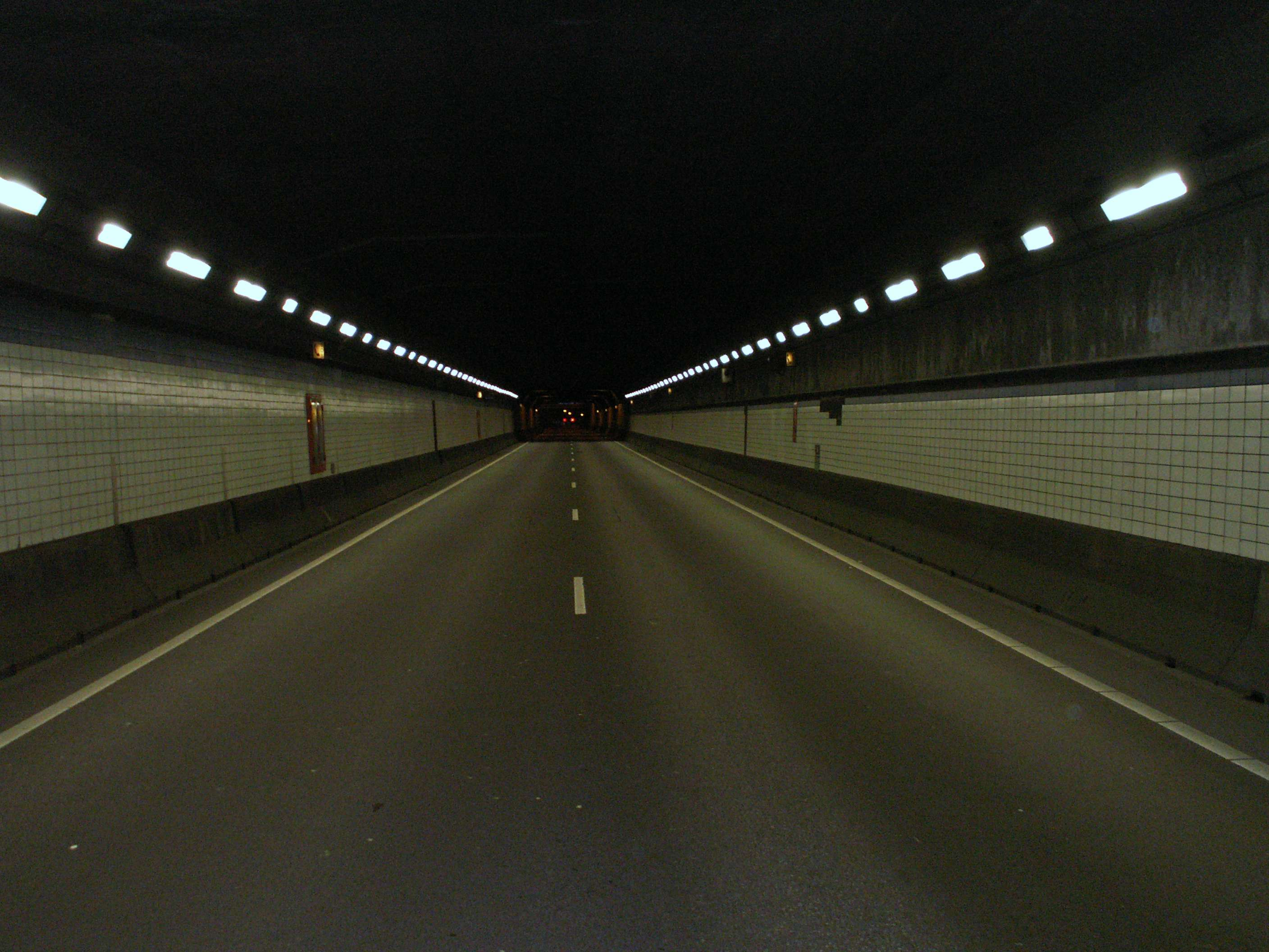 East tube Coentunnel in Amsterdam Netherlands